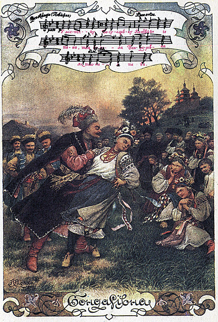 Листівка "У МІСТЕЧКУ БОГУСЛАВКУ"